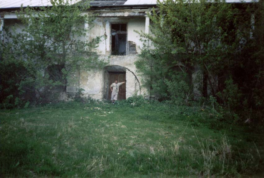 Пам'ятка архітектури